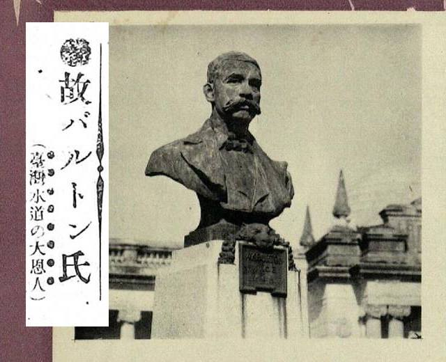 紀念衛生工程顧問技師巴爾頓。